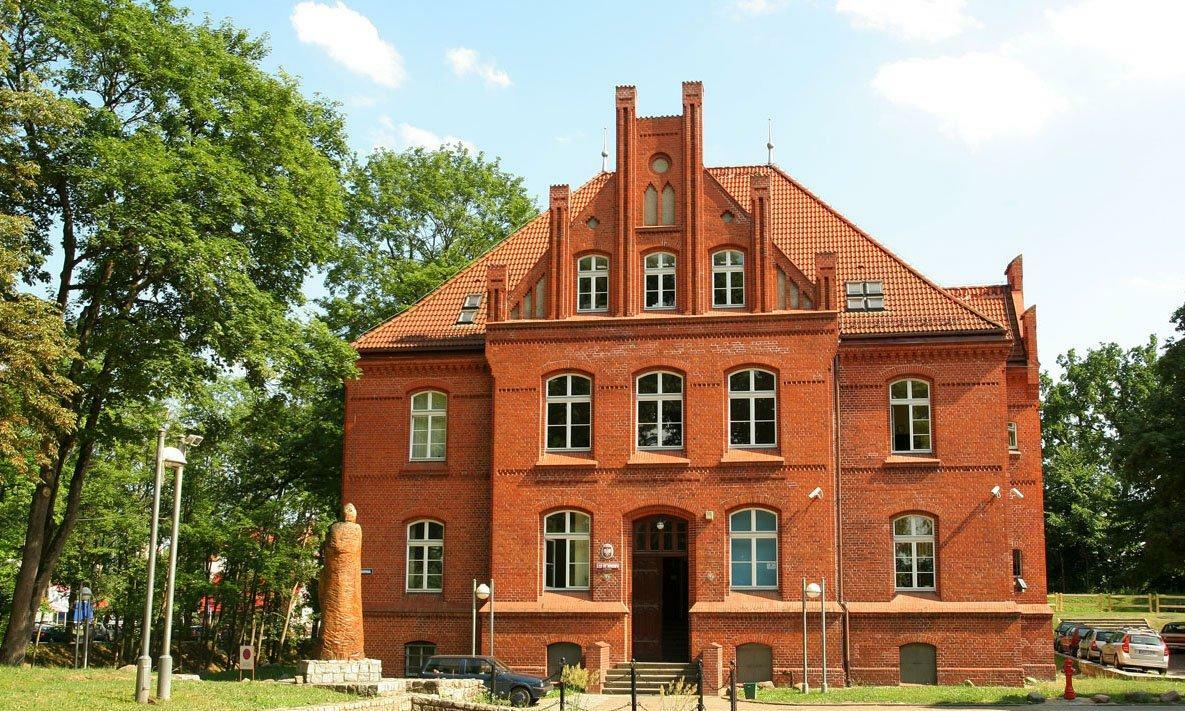 Neogotycki budynek Sądu Rejonowego